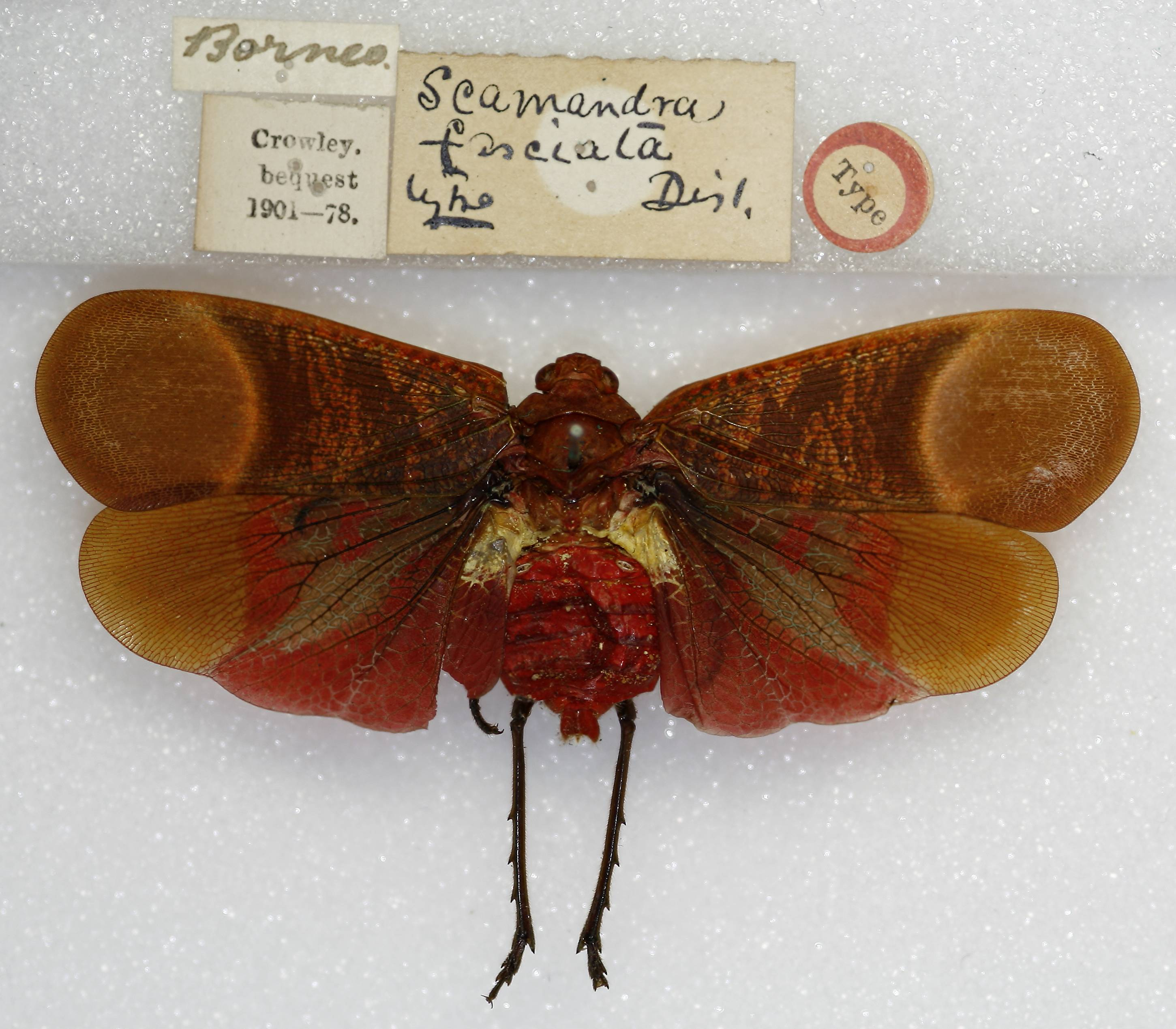 Scamandra fasciata Type